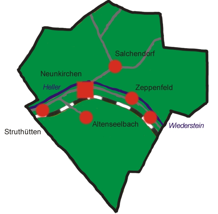 Eigene Zeichnung, Schumir 2005